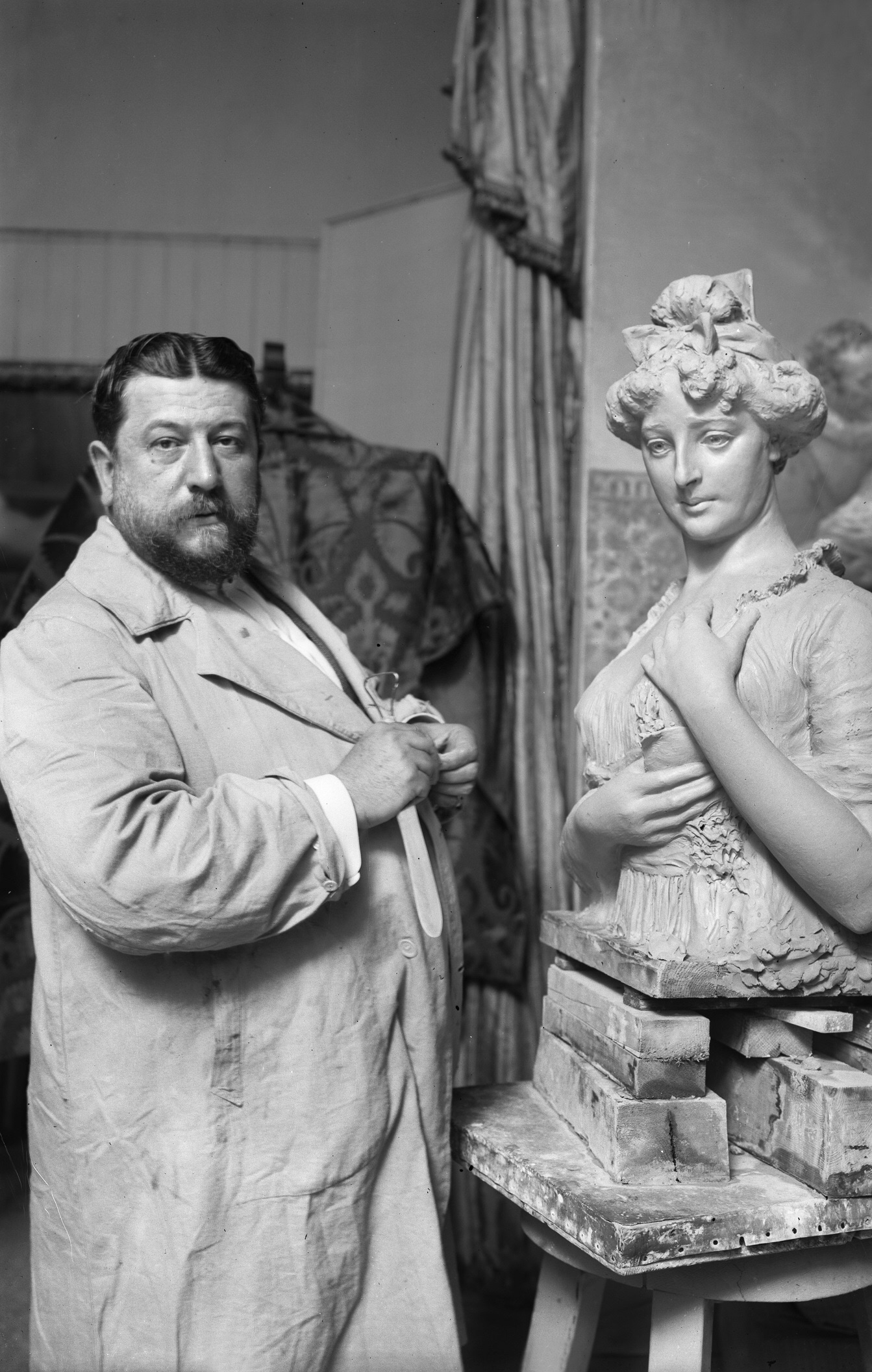 José Llaneces en su estudio. 1915